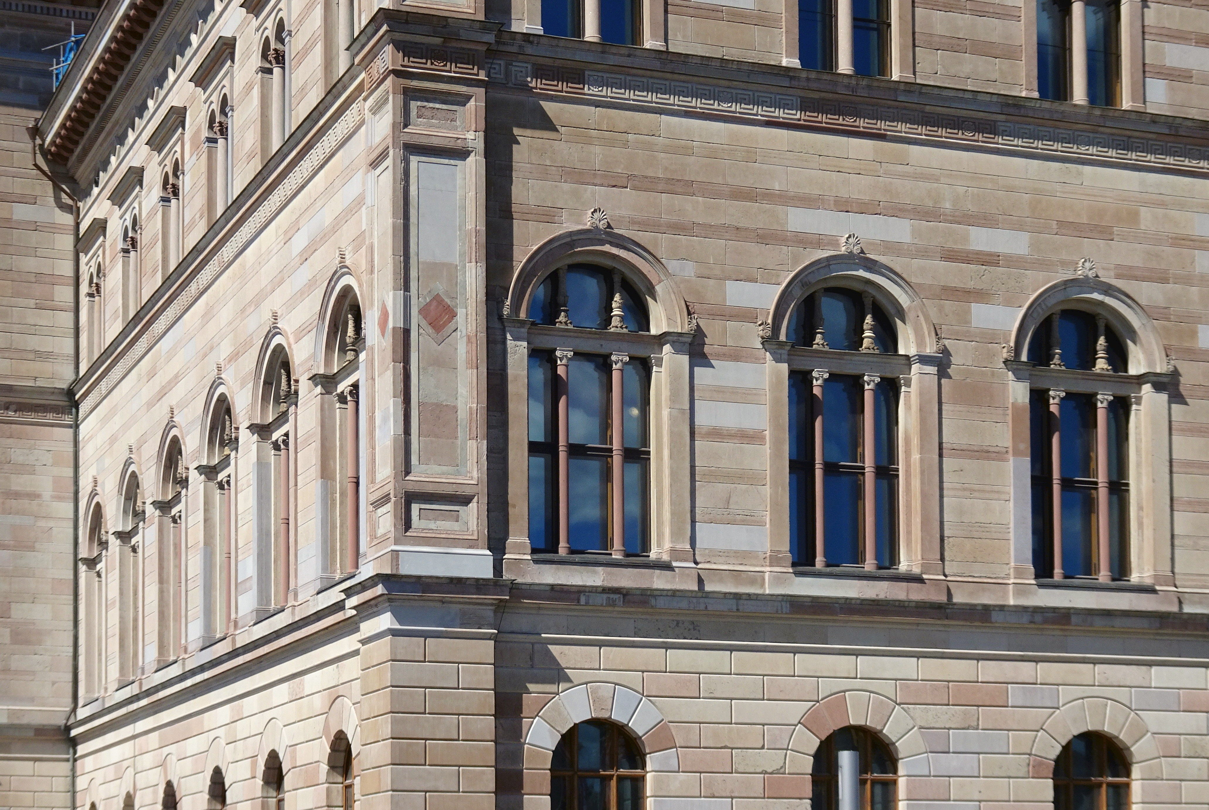 Nationalmuseum, renoverad fasad